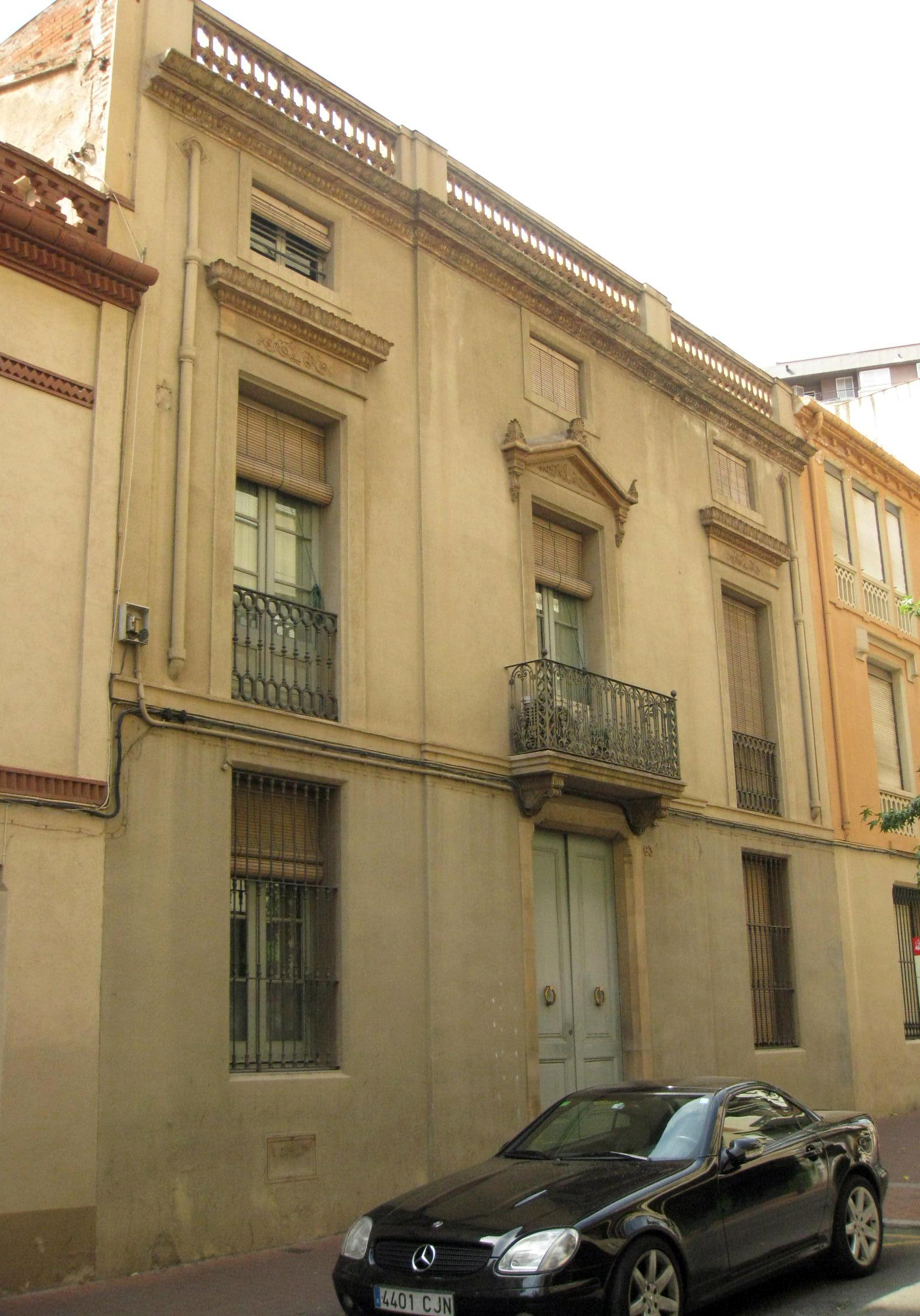 Casa Pere Comerma III, al carrer del Nord núm. 63. (Terrassa)